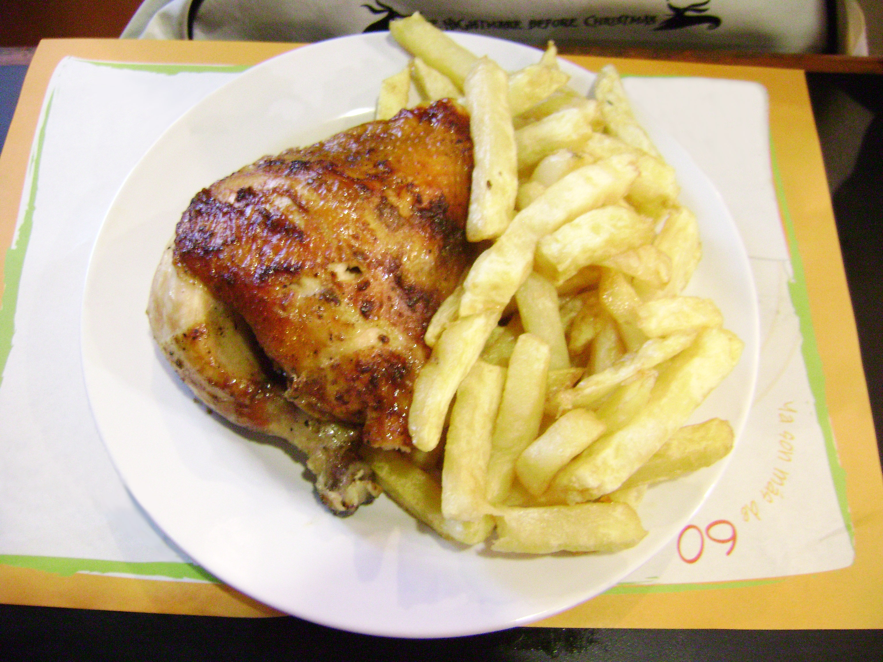 Un cuarto de pollo, presa pierna. Lima-Perú, 2009.